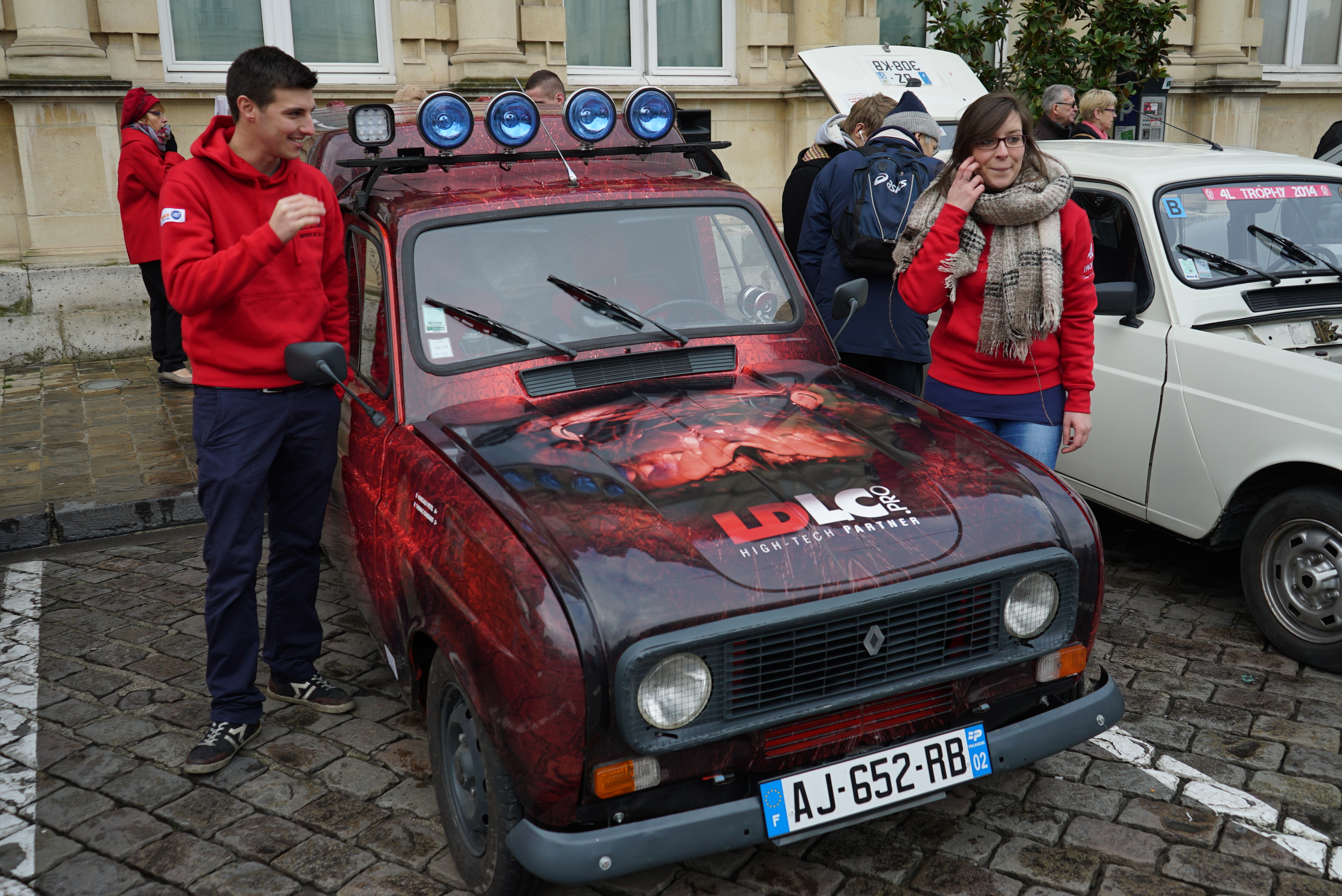 lors du 4L trophy 2016 rassemblement de Reims.